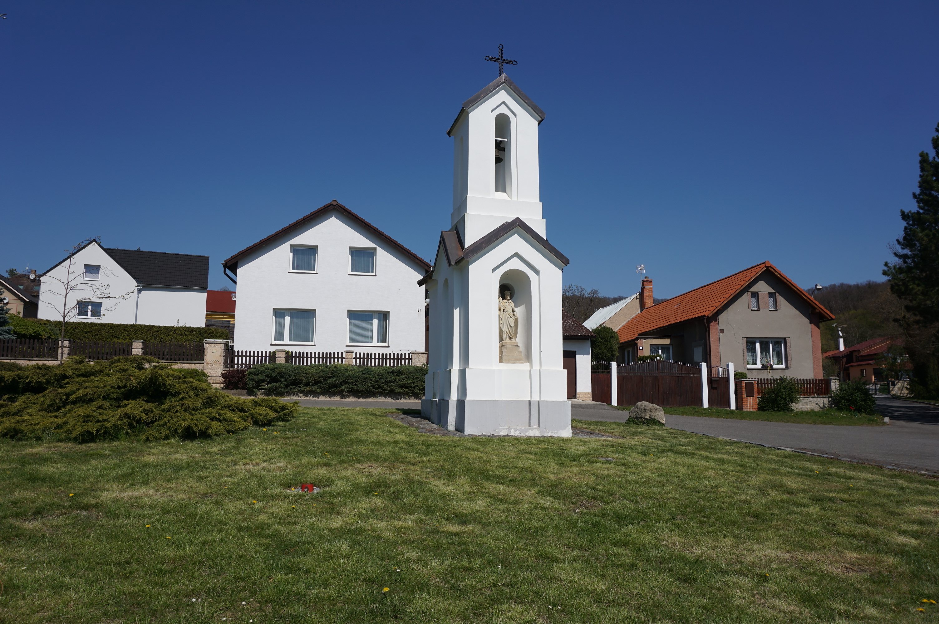 Nepřevázka - kaple na návsi